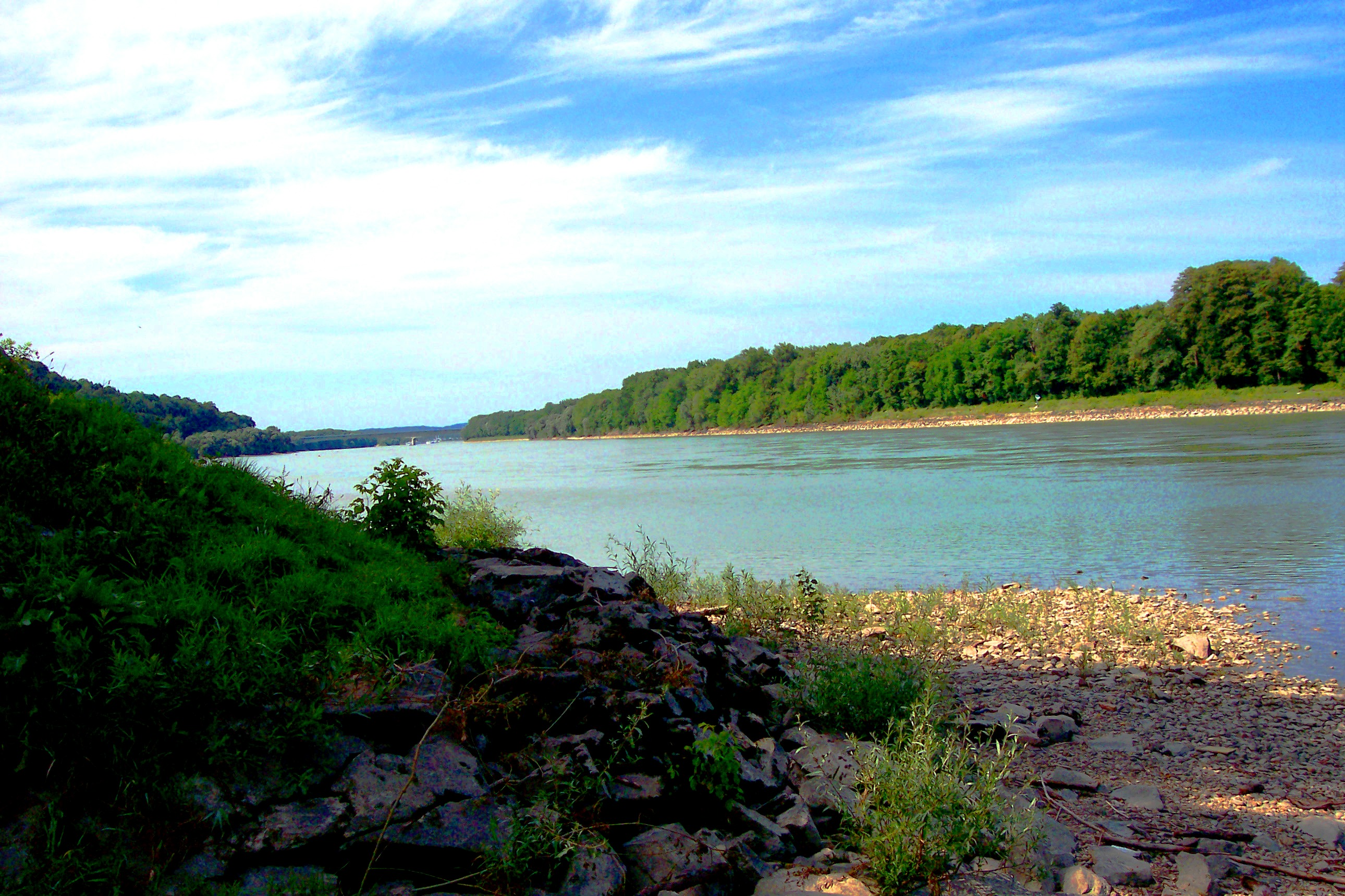 Danube in Austria